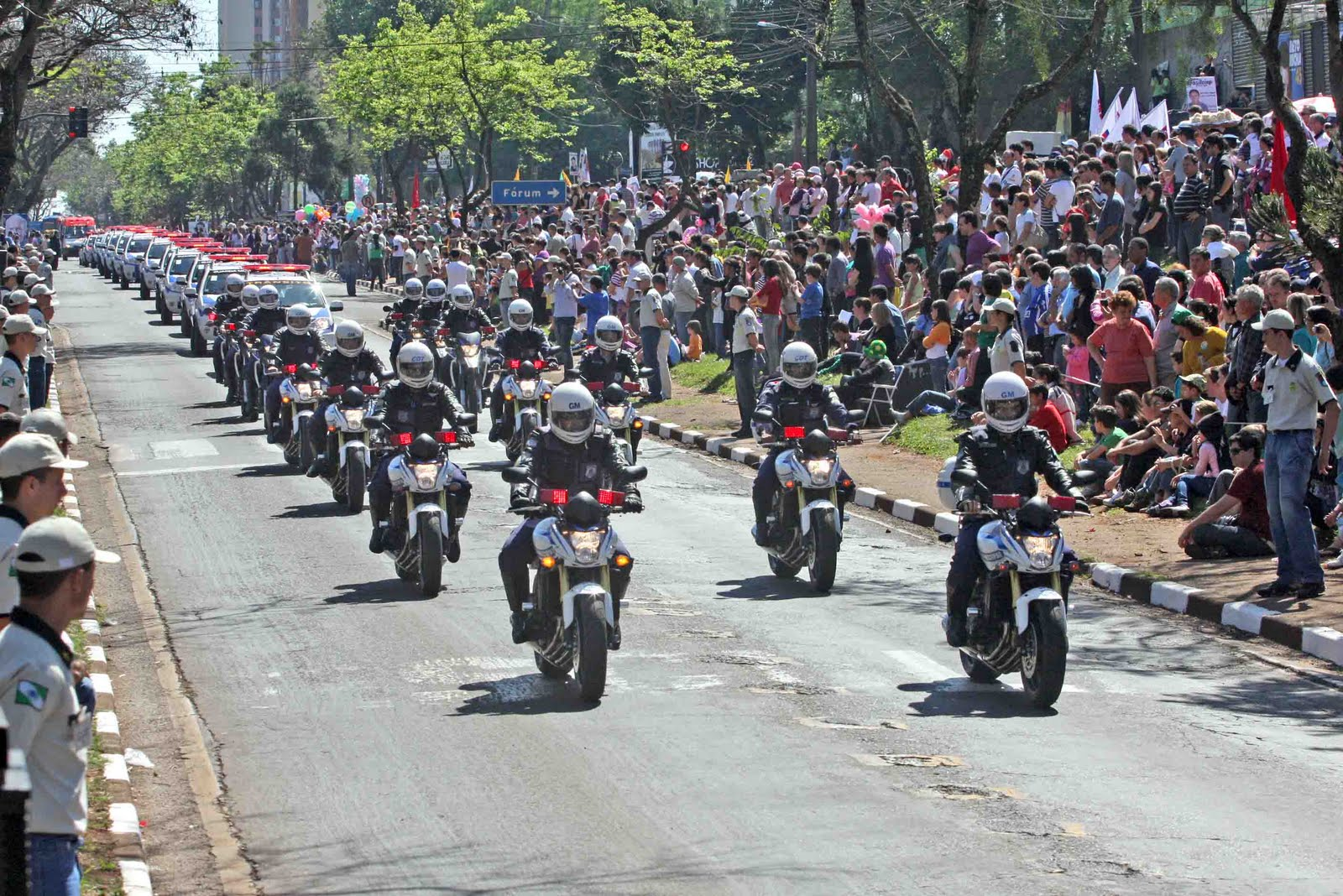 Motociclistas da Guarda Municipal de Foz do Iguaçu - Desfile